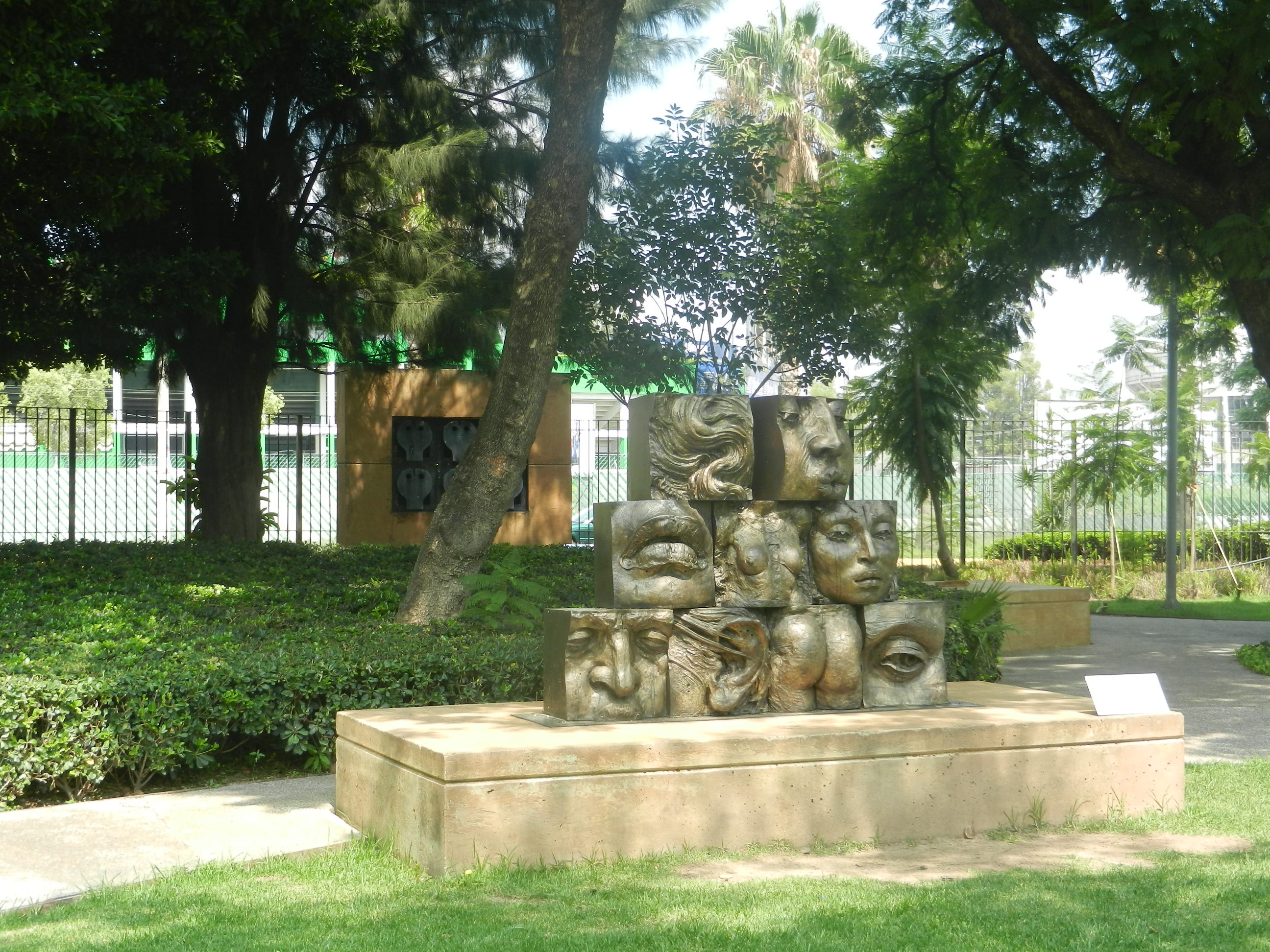 Cubos del artista Javier Marín en el Jardín de las Esculturas del Museo de Arte e Historia de Guanajuato